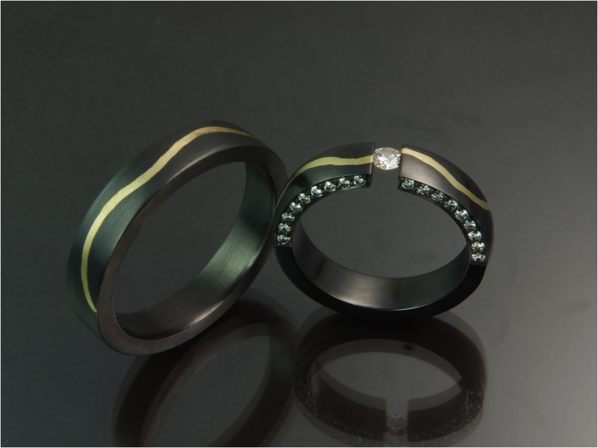 Corinthium aes Unikat Schmuck